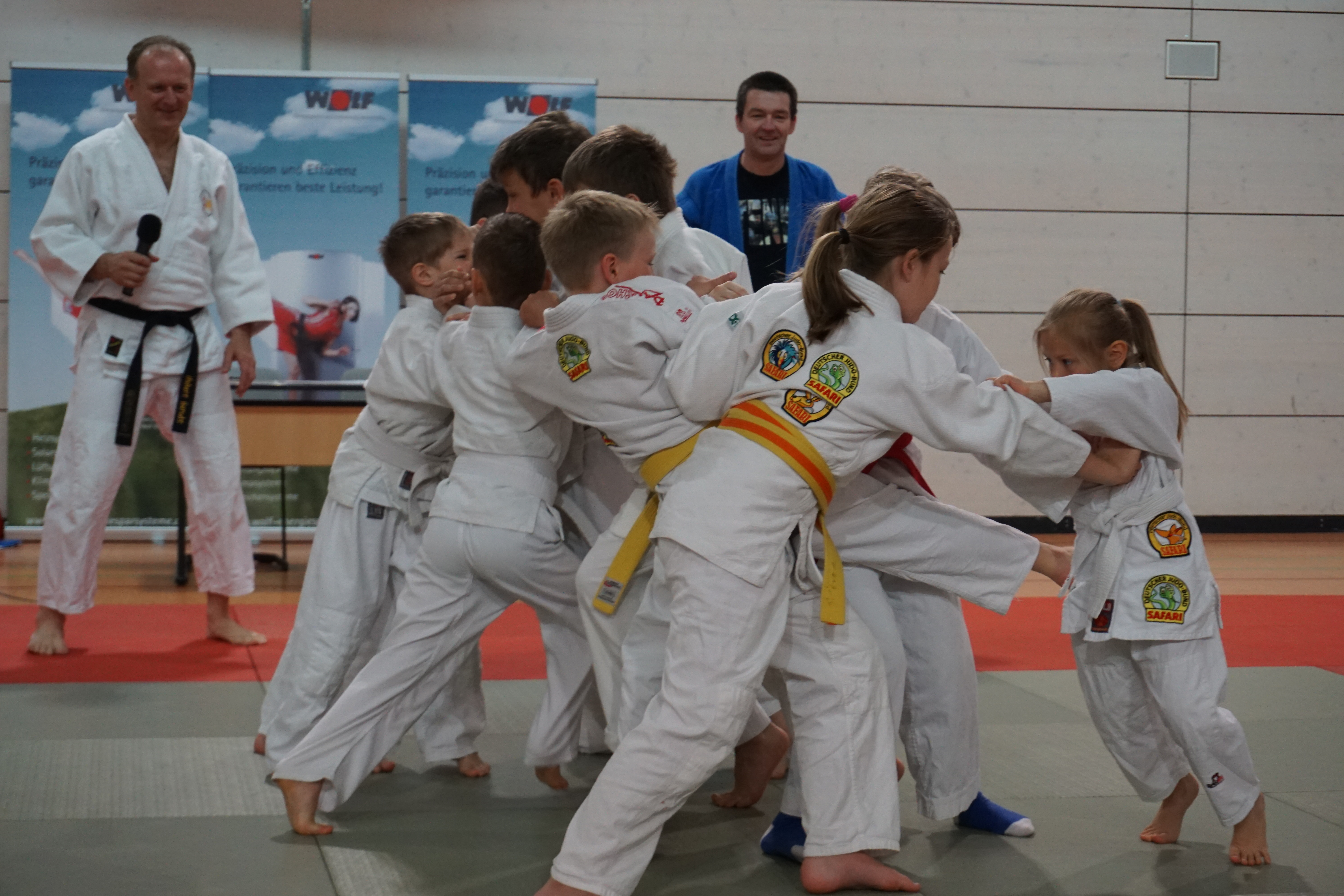 29.04.2017. Demonstration Stenka. Kinder in 2 Gruppen führen einen klassischen Angriffskampf im Rahmen des 1. Internationalen Kampfsport Landeslehrganges in Pfaffenhofen/Ilm durch.